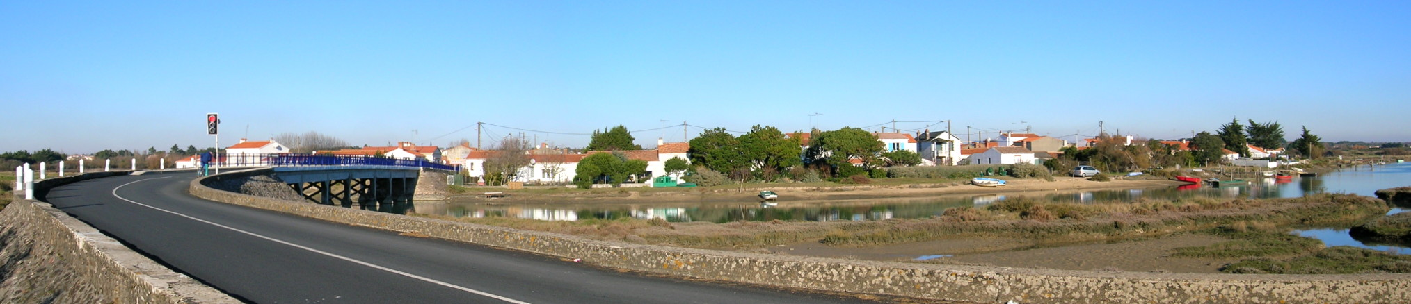 La Gachère sur le bord de l'Auzance